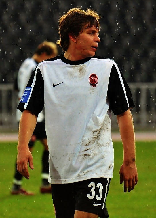 Максим Иванович Белый — украинский футболист.